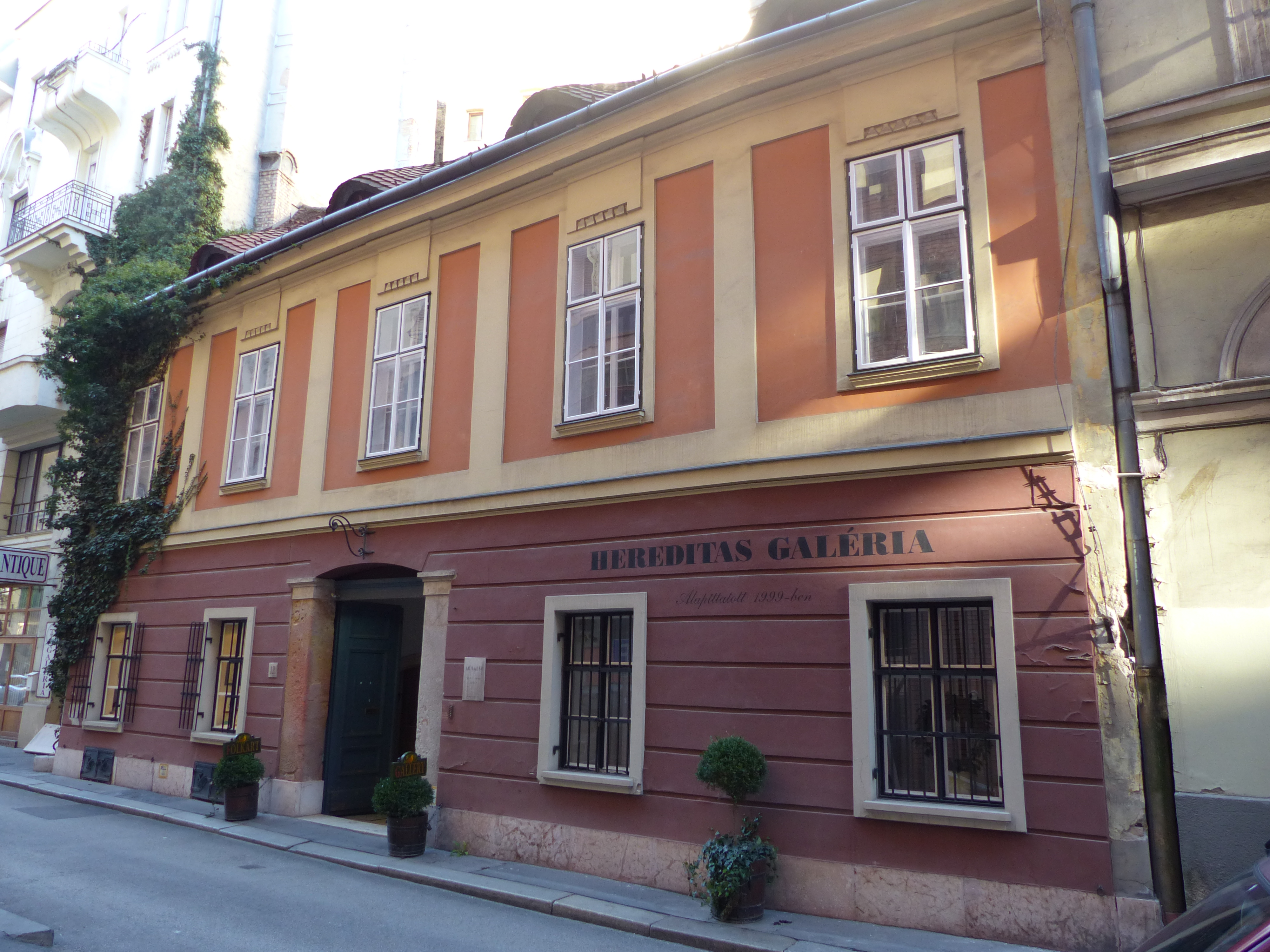 A felvétel 2016. december 27-én készült a Belvárosban, Budapesten. Vitkovics Mihály utca 12 szám. Régi jó Budapest söröző. (Korábban Schaffer ház, Horváth ház). Közzétéve: (1-4) (hozzáférés: 2016.12.28)